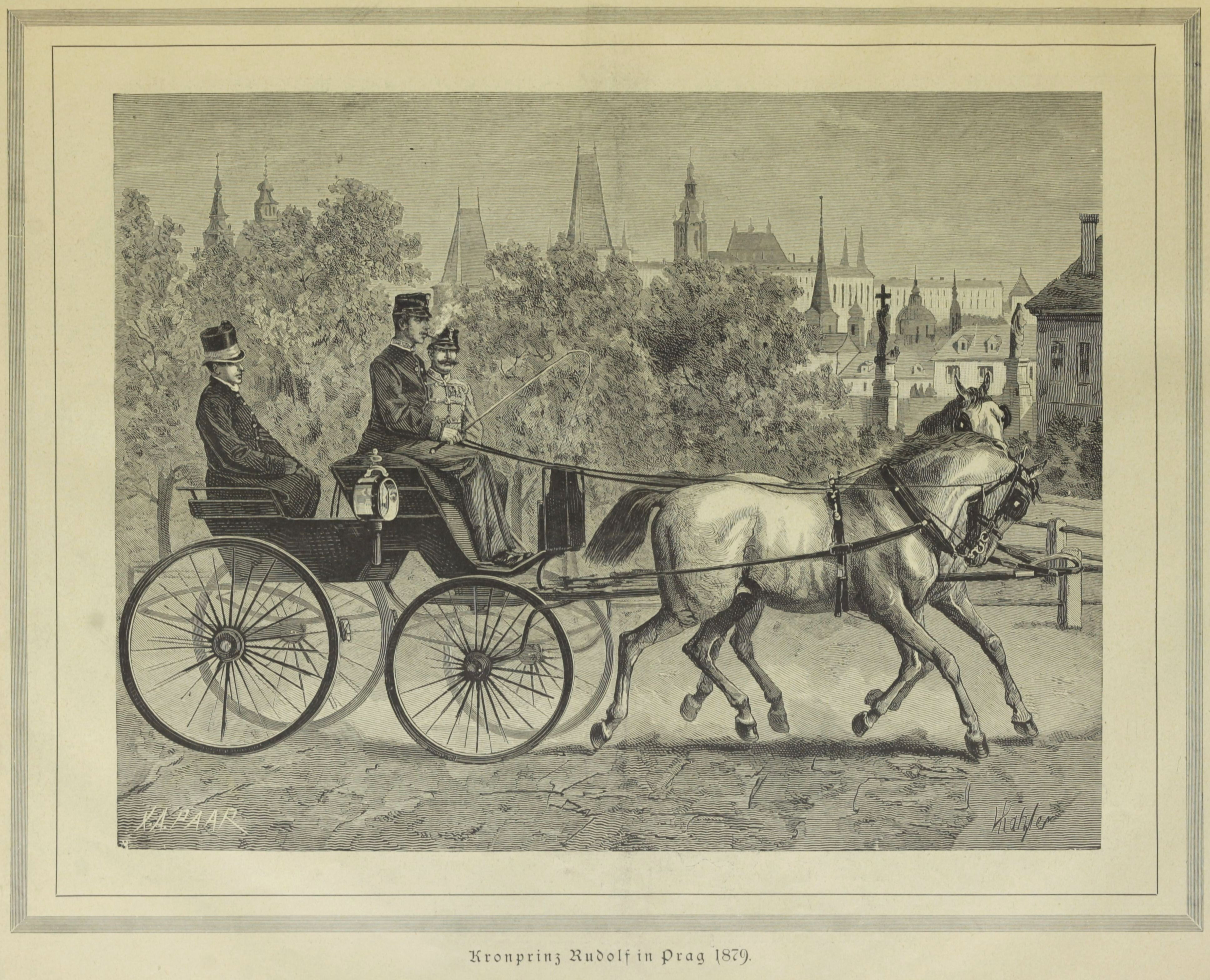 Rudolf bakon ülve